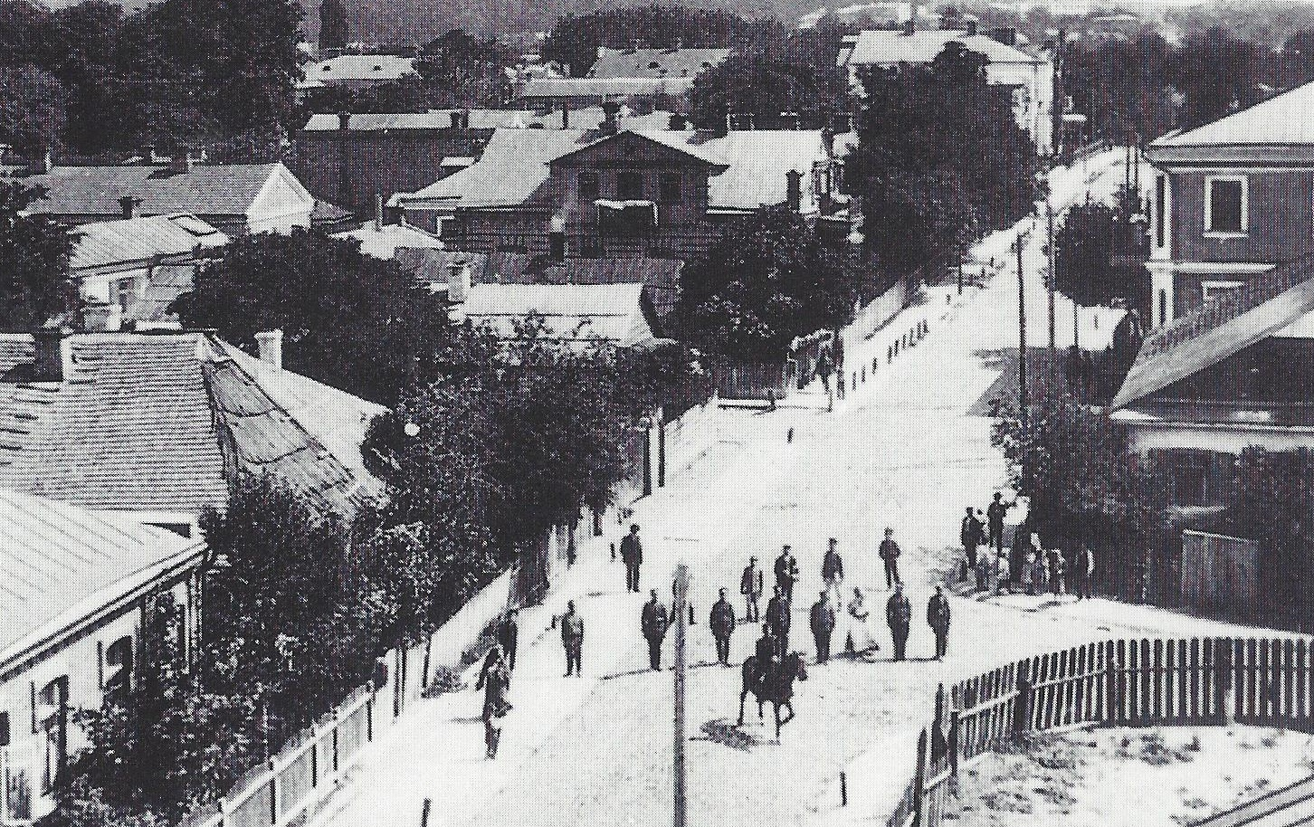 Die offiziell so benannte «Deutsche Straße» in Rowno.